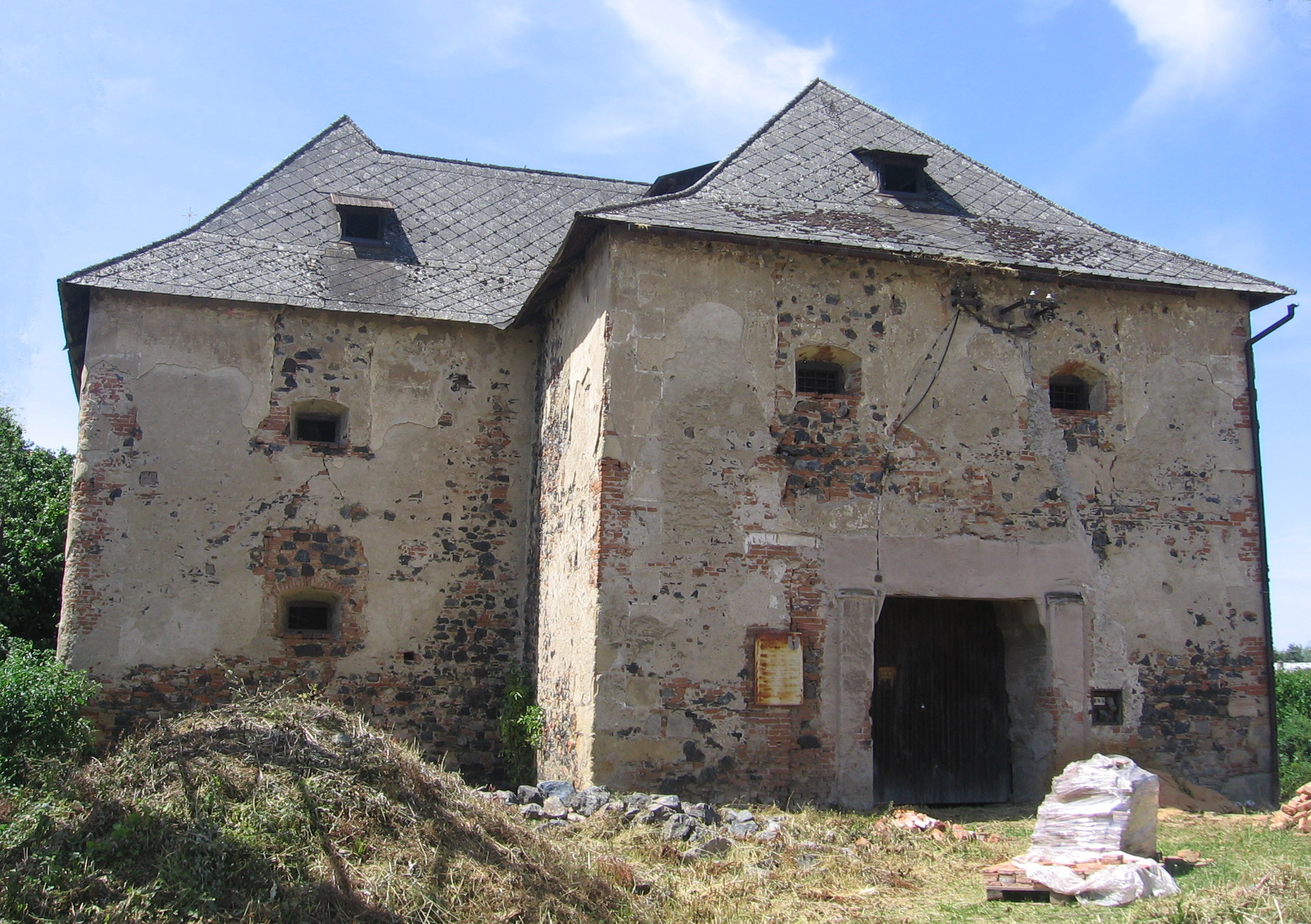 Tvrz, v areálu hospodářského dvora čp. 4, Řenče.